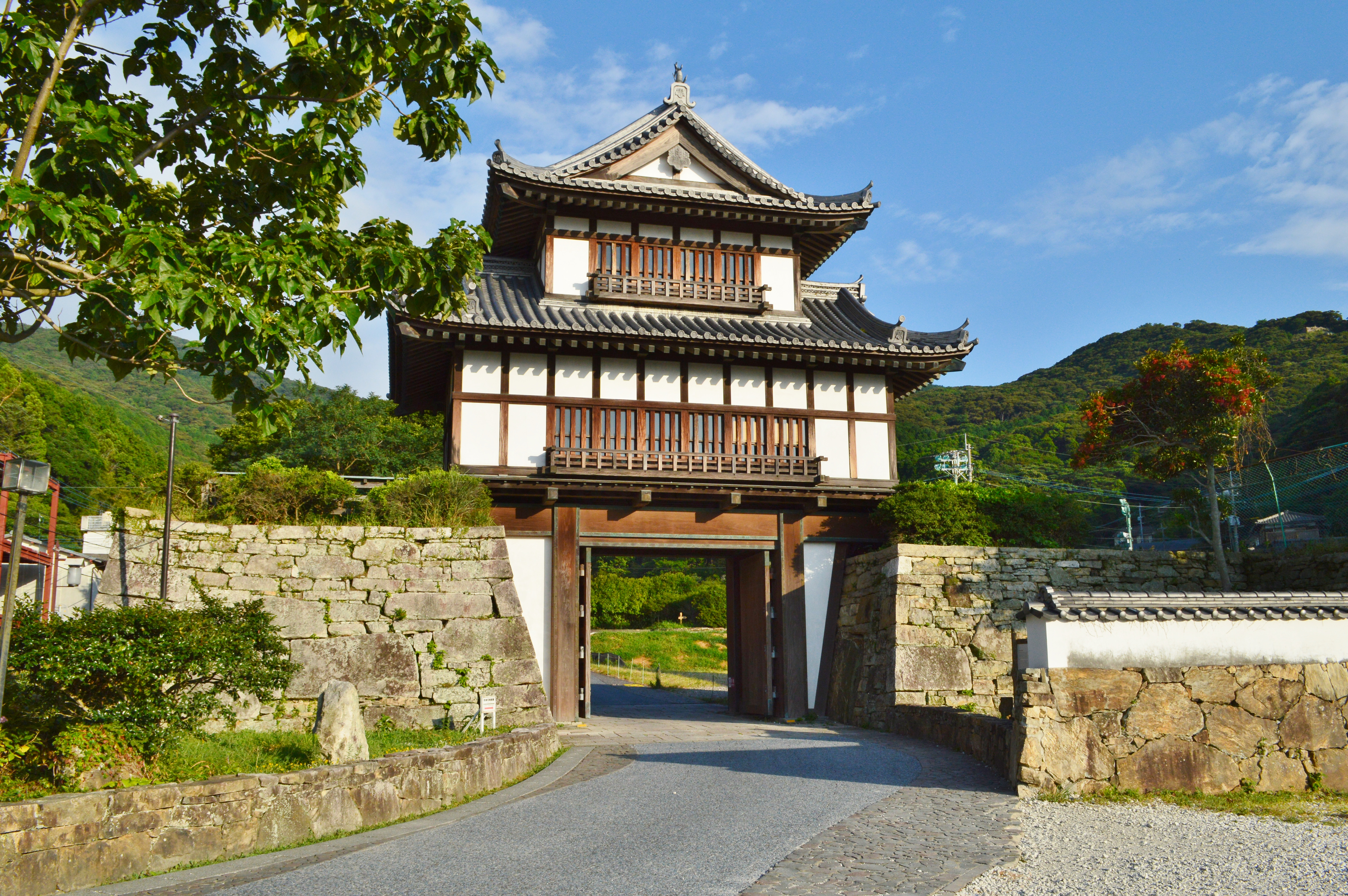 金石城 櫓門